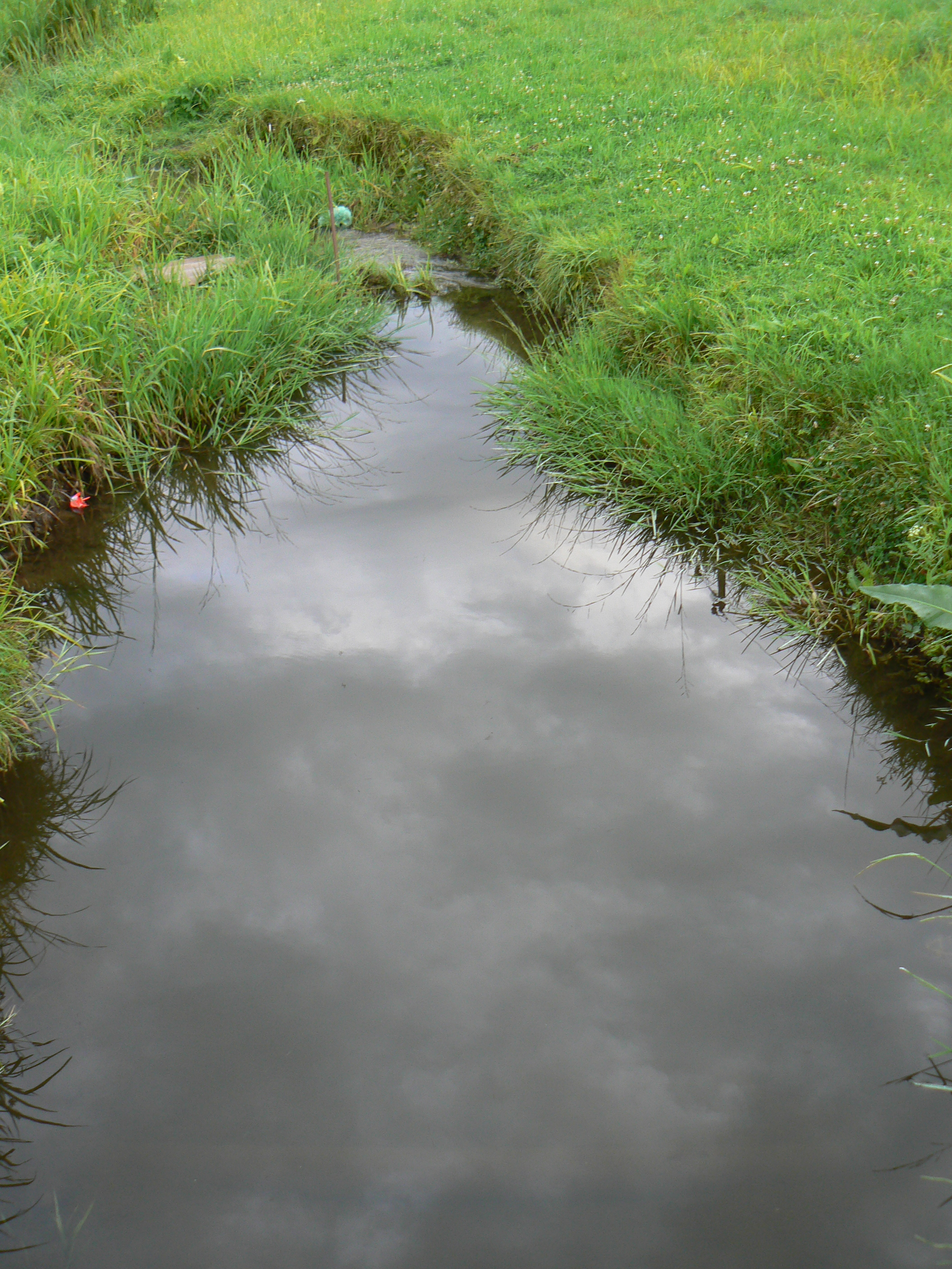 Darba v Darbėnech. Pohled po proudu (t.j. k západu) z lávky přes říčku. Darba zde protéká paralelně se silnicí č. 2323 (Darbėnai - Vaineikiai 45 m severně od ní.